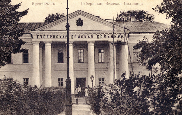 Postcards of old Kremenchuk. Губернська земська лікарня.